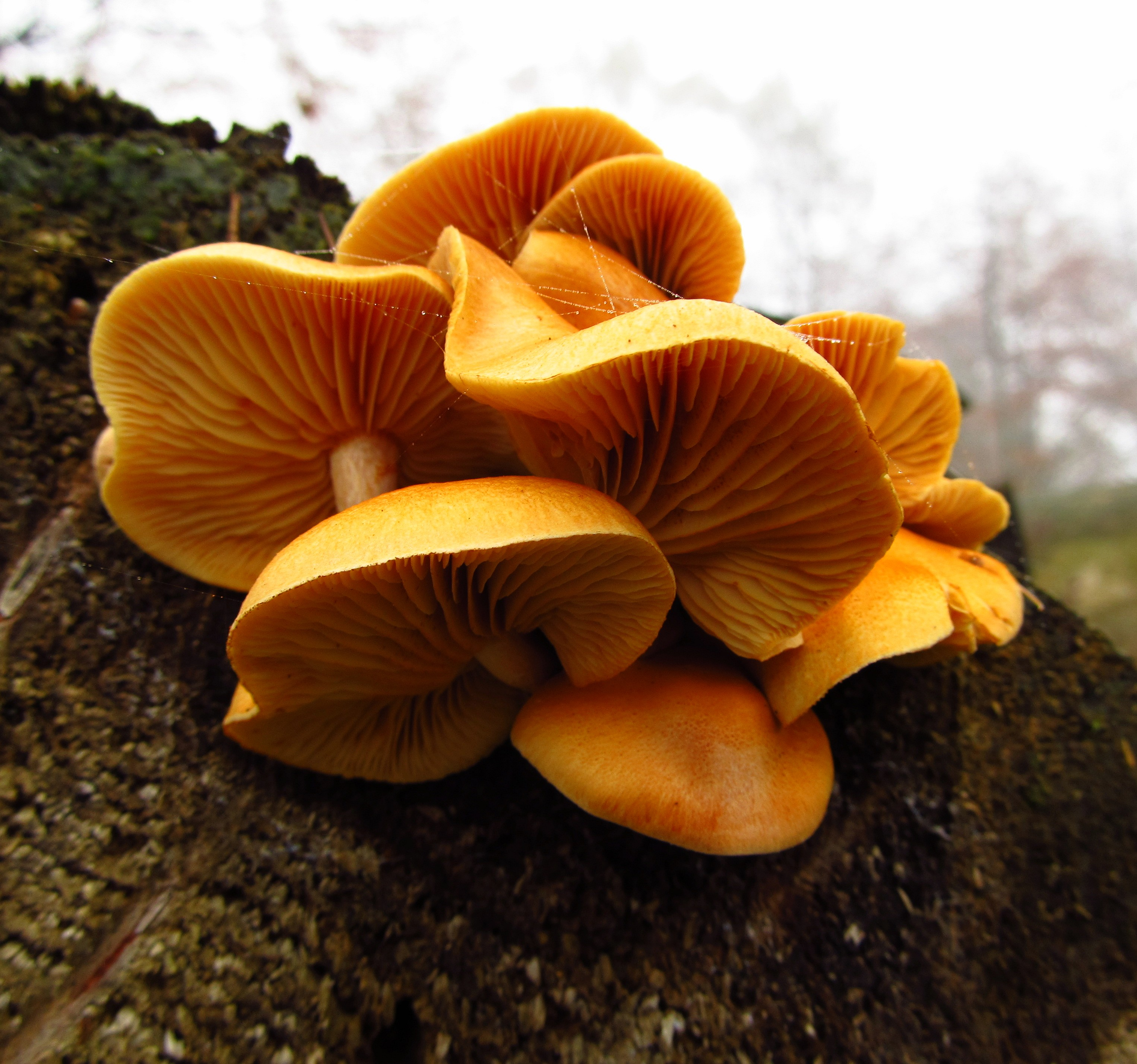 Der Geflecktblättrige oder Gemeine Flämmling (Gymnopilus penetrans) ist eine Pilzart aus der Ordnung der Champignonartigen (Agaricales). Sein Name weist auf die bräunlich gefleckten Lamellen im Alter hin. Geruch: angenehm pilzig, Speisewert: holzig-bitter, ungenießbar. Photo: 13.11.2011, Hochwald bei Xanten-Marienbaum/ Kreis Wesel/ Niederrhein.